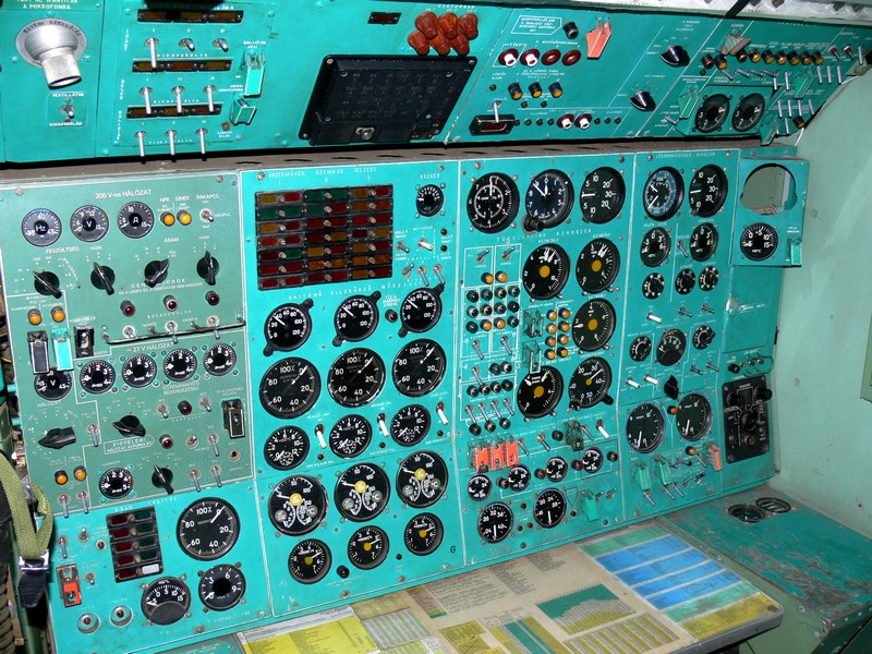 Tupoljev Tu-154 pilótafülke részlete - A fedélzeti mérnök helye (Ferihegy Repülőgép Emlékpark, Budapest)